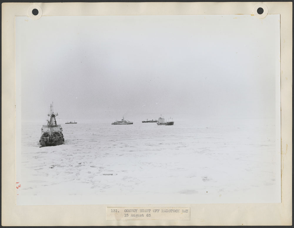 Title / Titre : A convoy beset off Radstock Bay / Un convoi clavé au large de la baie Radstock Creator(s) / Créateur(s) : Unknown / Inconnu Date(s) : August 15, 1963 / 15 août 1963 Reference No. / Numéro de référence : MIKAN 4374239 Location / Lieu : Canada Credit / Mention de source : Library and Archives Canada, e011061783 / Bibliothèque et Archives Canada, e011061783